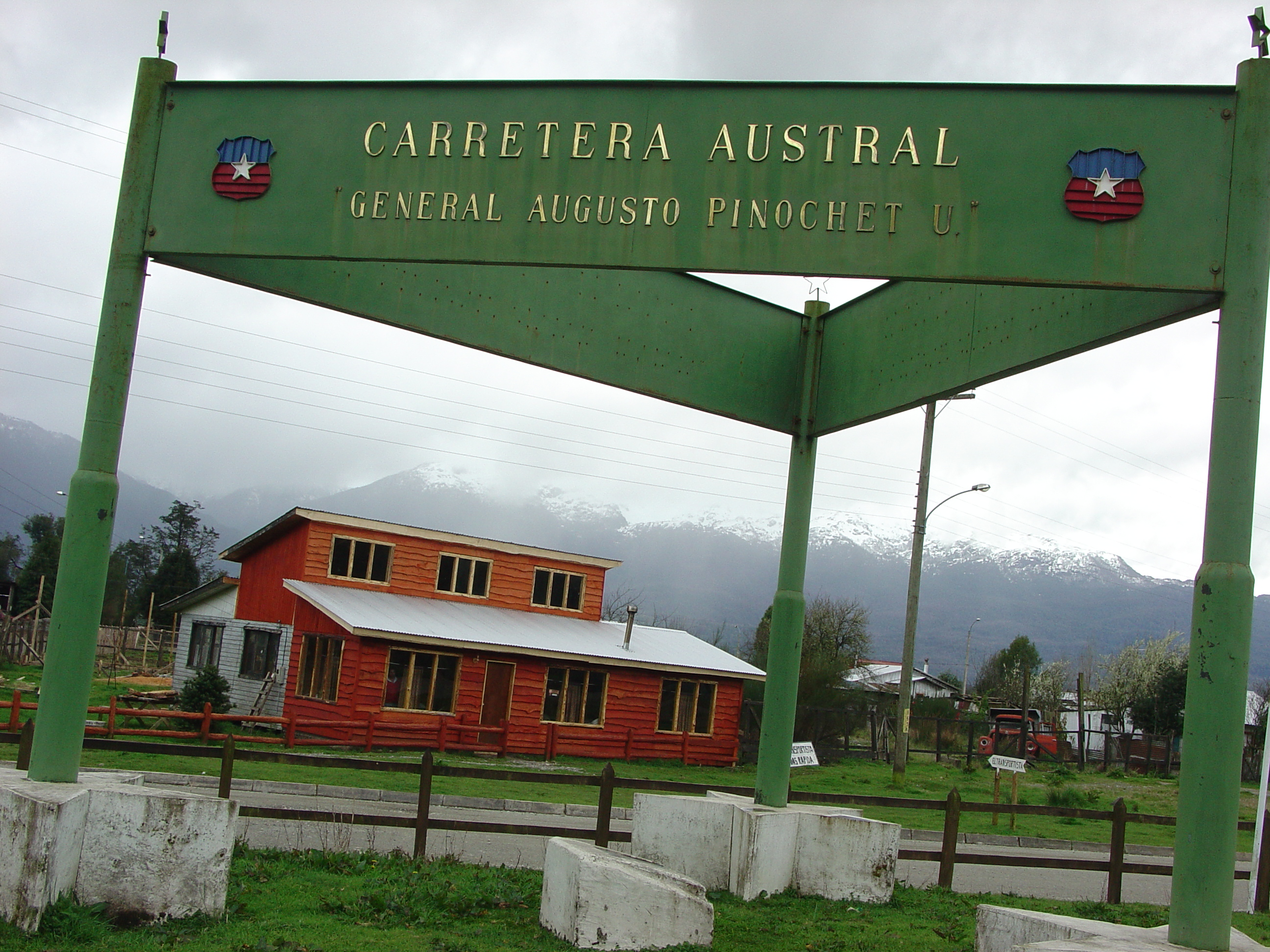 La Carretera Austral (Ruta CH-7) es una carretera chilena, que se encuentra en la Zona Sur de Chile. En su recorrido actual de 1.240 kilómetros une Puerto Montt con Villa O'Higgins,[1] siendo la principal vía de transporte terrestre de la XI Región de Aisén y de la Provincia de Palena en la X Región de Los Lagos, permitiendo su conexión con el resto del territorio del país. Debido a las complicadas características geográficas del territorio, en el que predominan los Andes Patagónicos, lagos, turbulentos ríos y la presencia de campos de hielo, la construcción de la Carretera Austral está en permanente reparación aún cuando la mayor parte de sus tramos están operativos. Por otro lado, gran parte de la ruta carece de pavimentación. La Carretera Austral es también conocida de forma no oficial y propagandística como la Carretera Presidente Pinochet o la Carretera Longitudinal Austral Presidente Pinochet, a pesar de que ningún documento oficial señale la existencia de dicho nombre para la ruta.